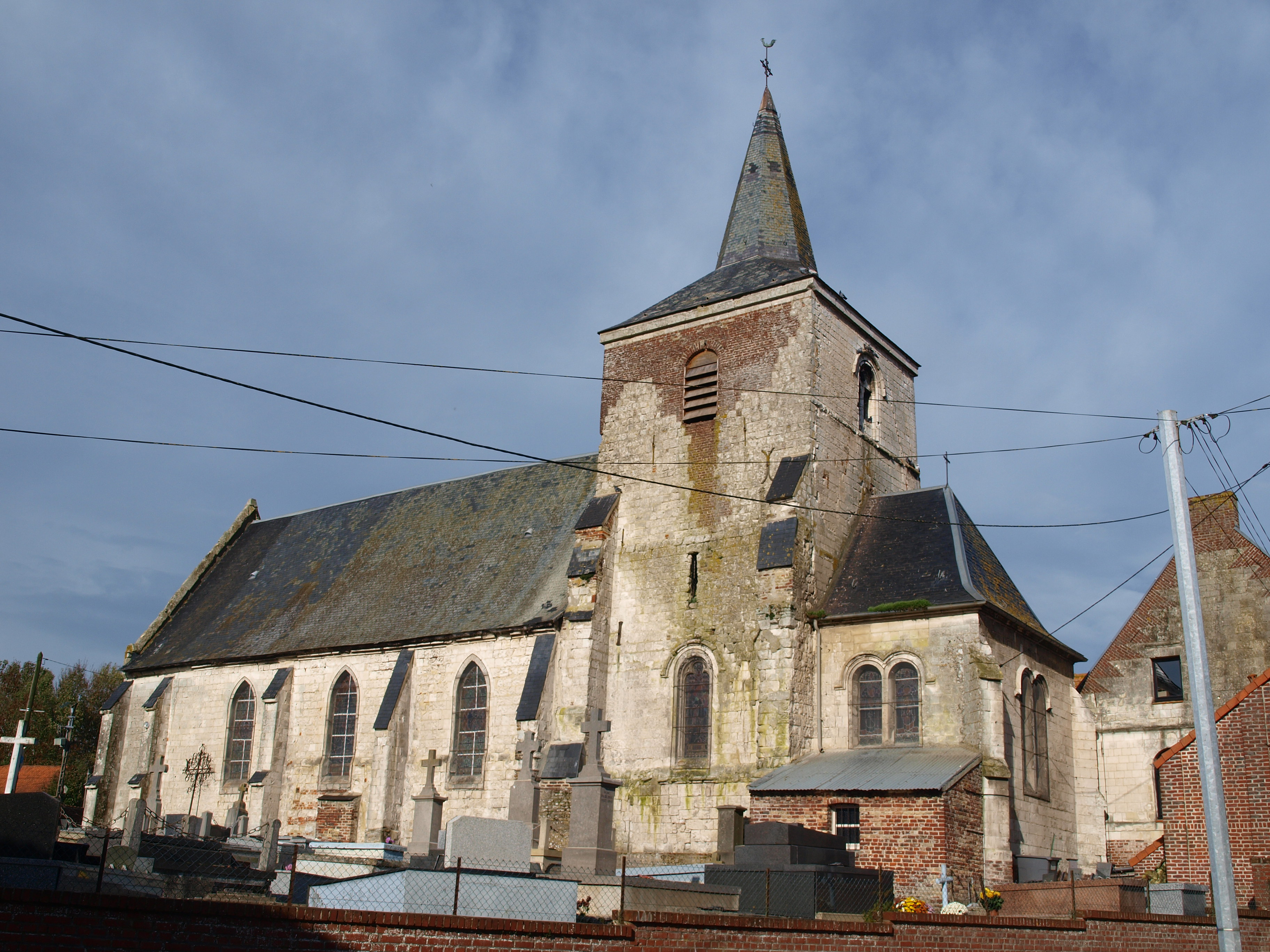 Inghem (Pas de Calais, France) ; église